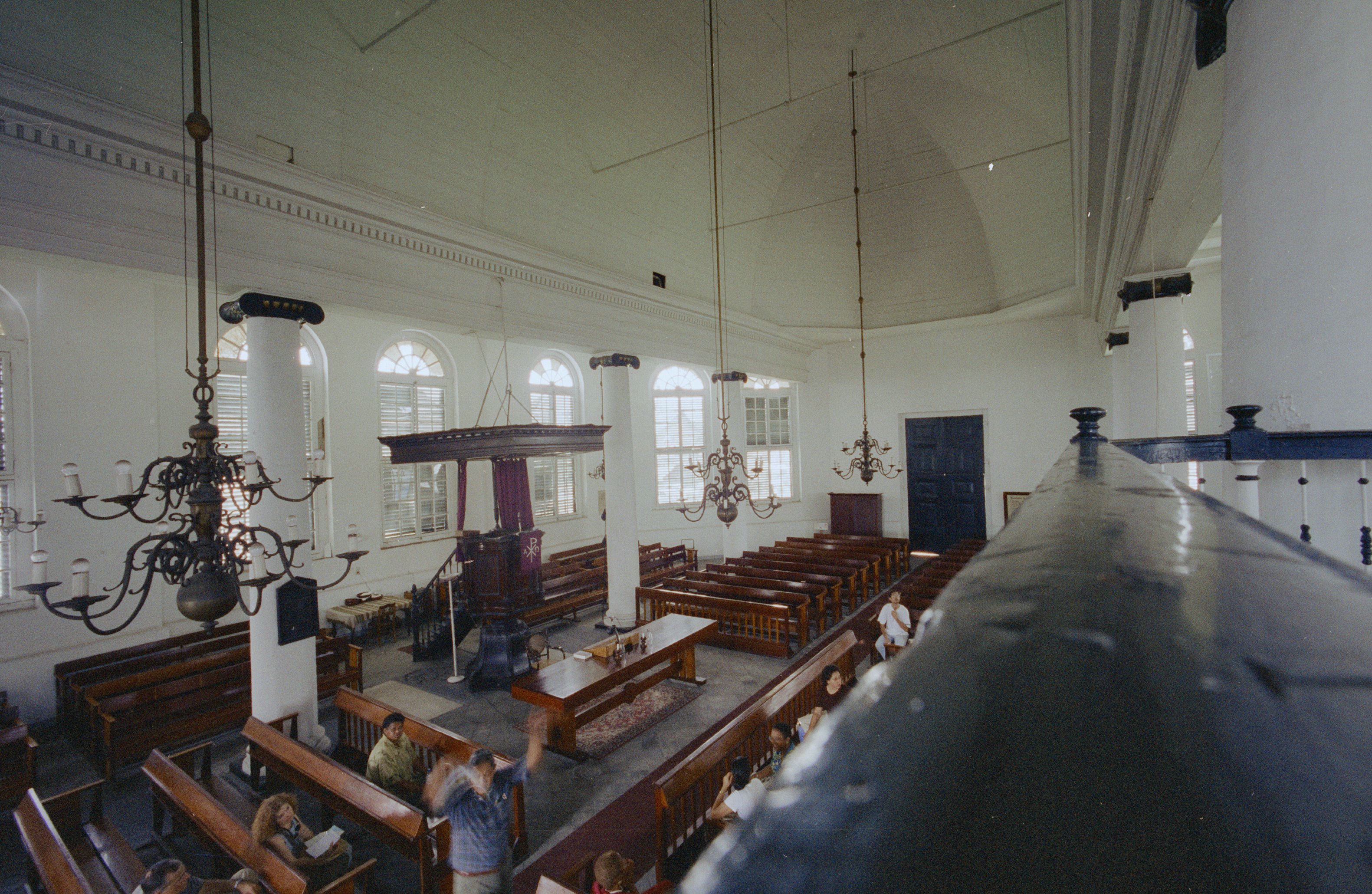 Koloniale geschiedenis/ Kerken: Overzicht interieur Hervormde Kerk (opmerking: Suriname reis Loek Tangel)